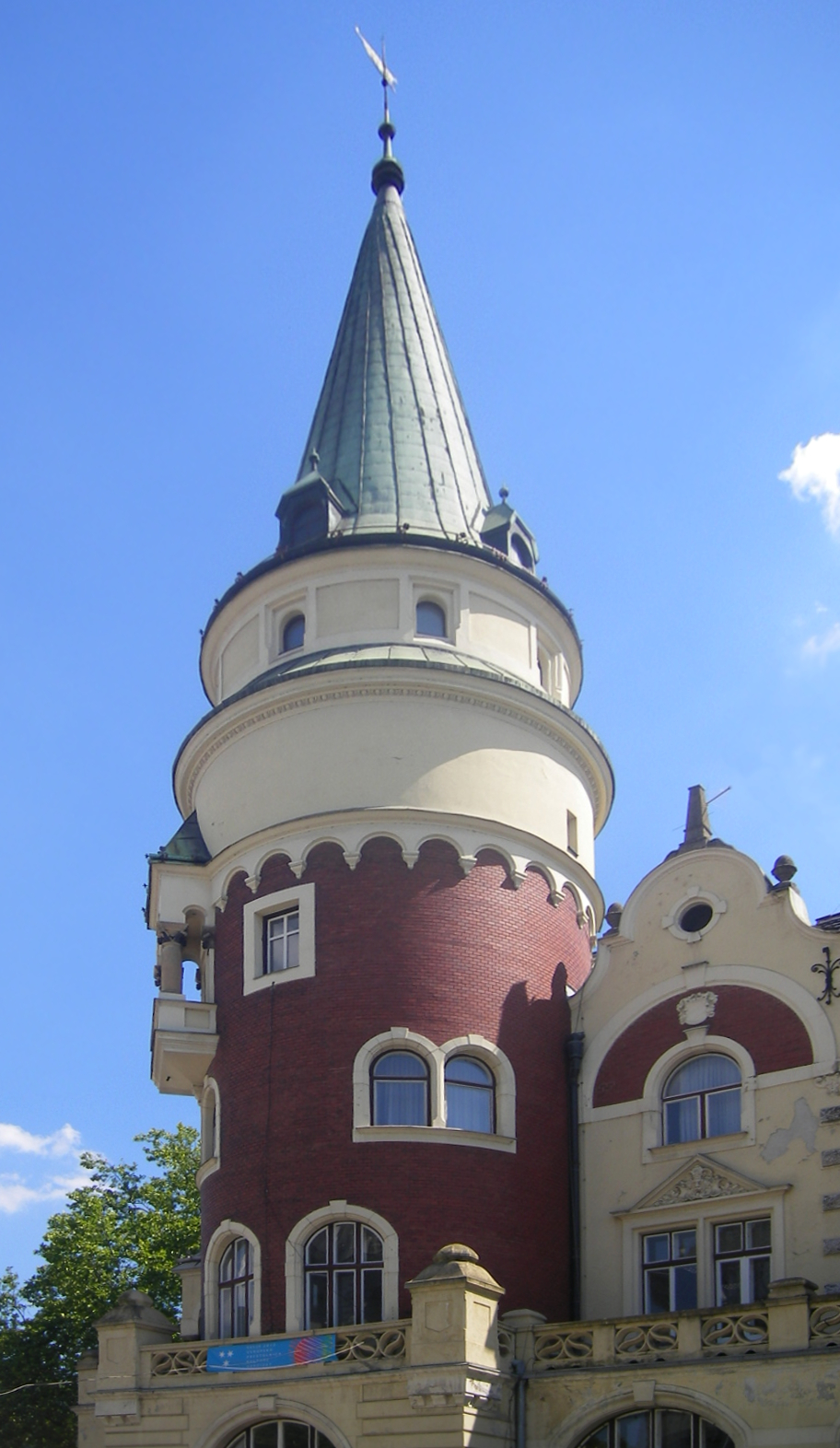 Celje